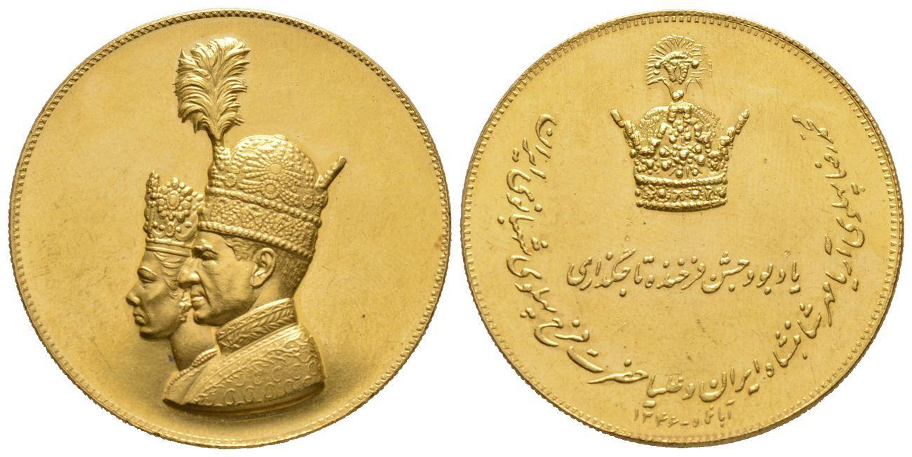 سکه طلا یادبود تاجگذاری